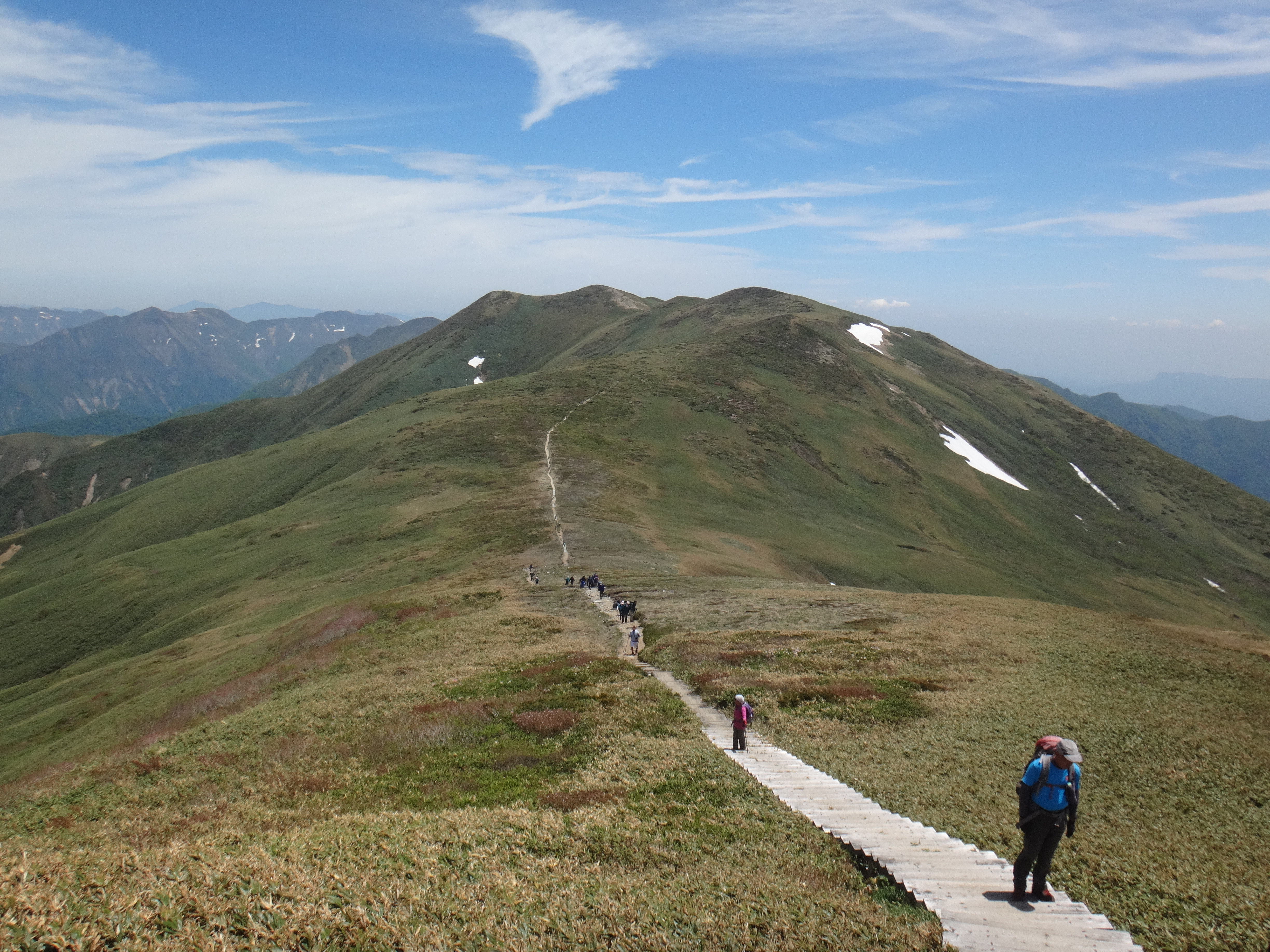 平標山から仙ノ倉山への縦走路